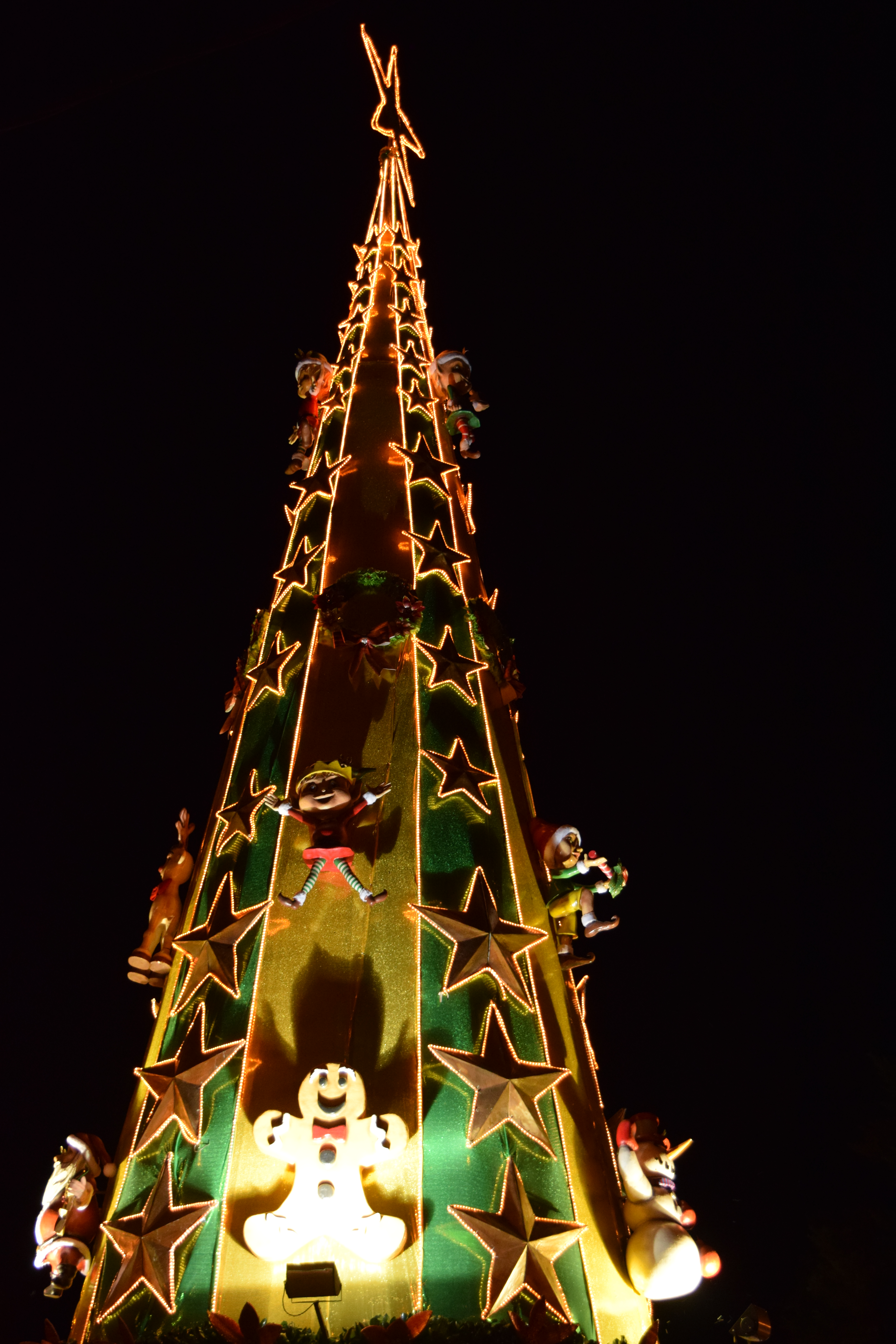 Árbol de navidad en una de las calles de la ciudad de Leandro N. Alem, provincia de Misiones (Argentina).